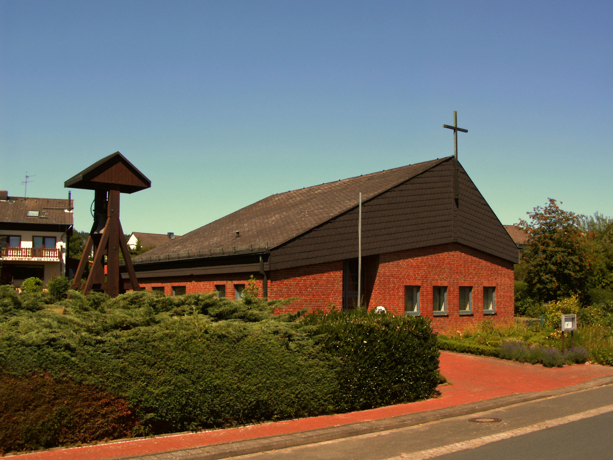 Katholische Kirche St. Hedwig in Völksen, Ortsteil von Springe